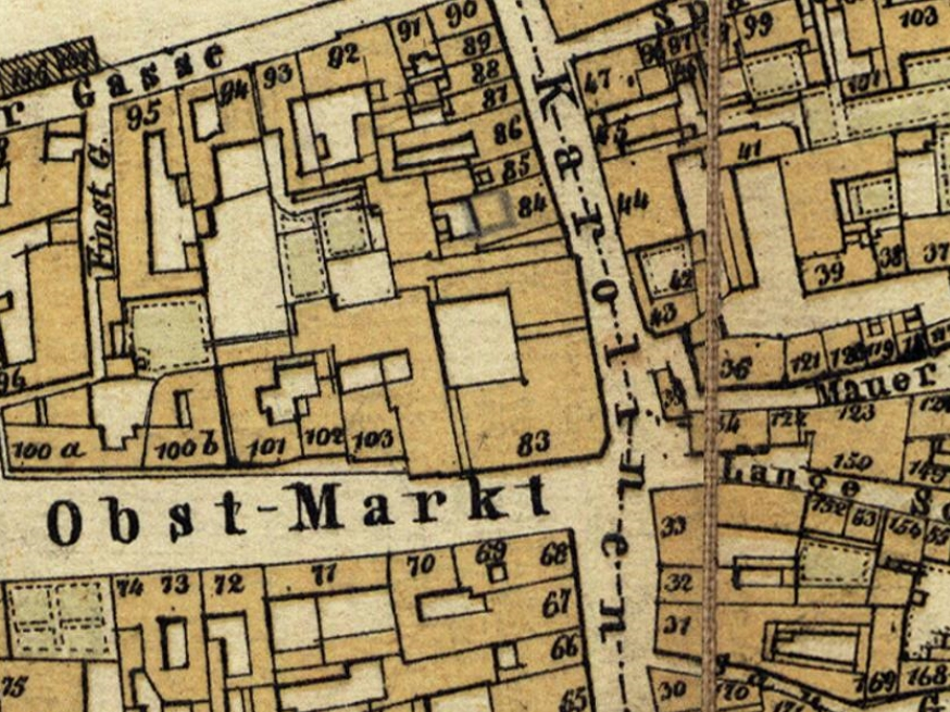 Auszug aus dem Stadtplan von Wenng aus dem Jahre 1874. Dargestellt ist in der Bildmitte das Riedingerhaus (Litera D 83).